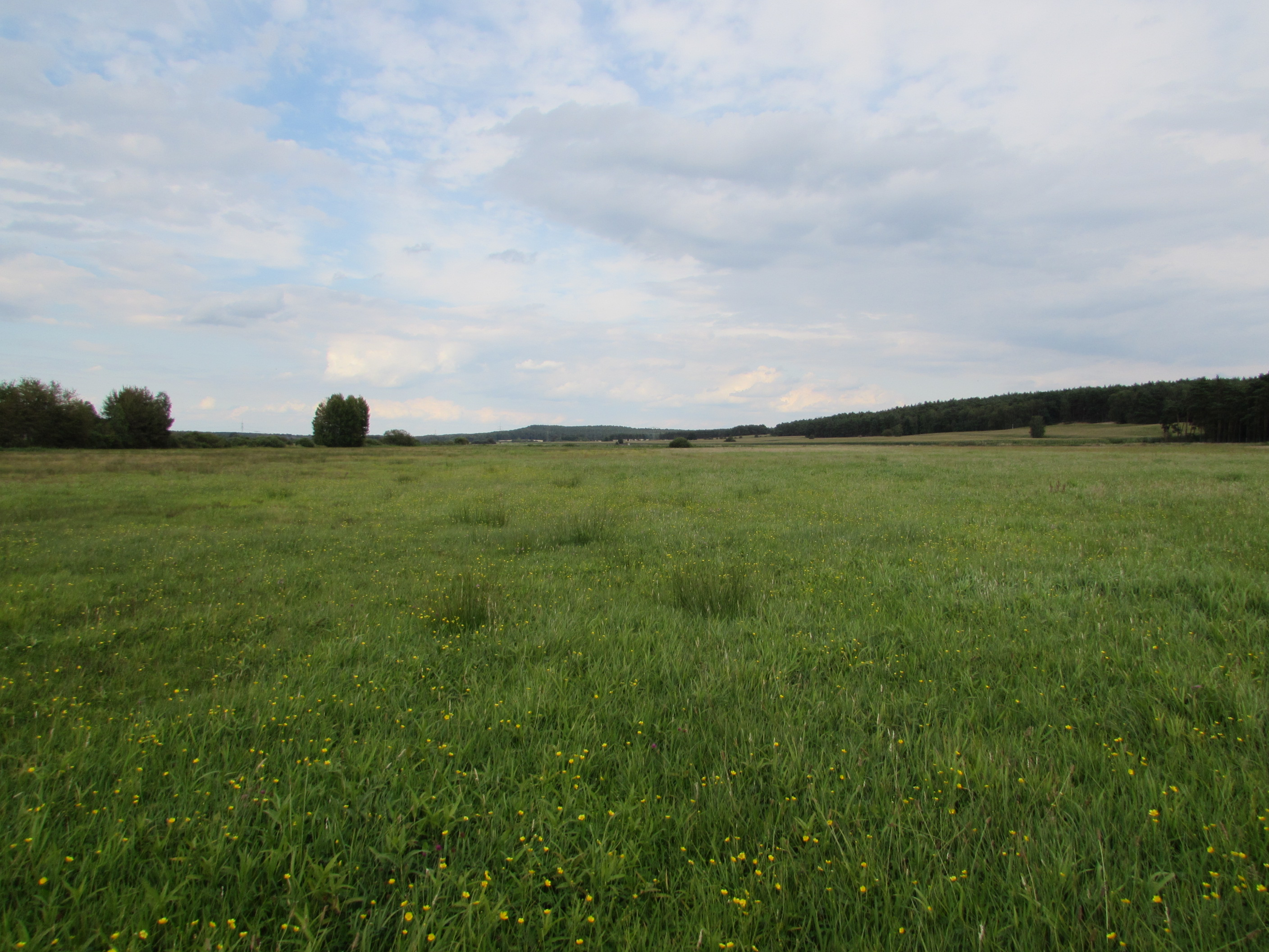 blick im marzahner fenn nach nordosten, gemeinde beetzsee